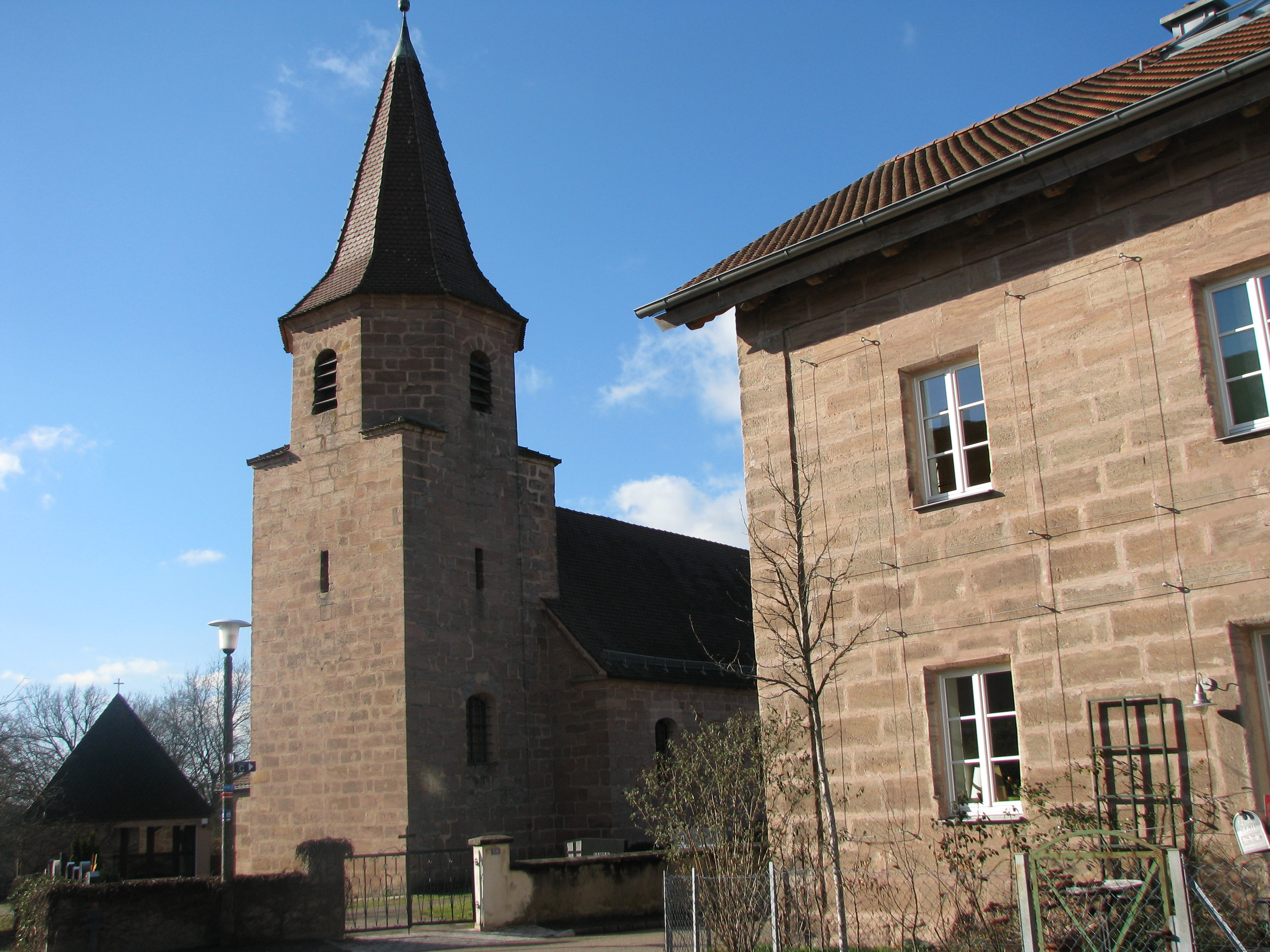 Heuberg, Ortsteil von Hilpoltstein im mittelfränkischen Landkreis Roth in Bayern, an der Kath. Filialkirche St. Walburga